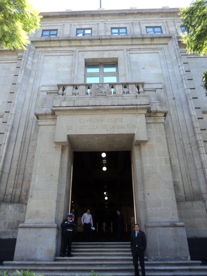 suprema corte de justicia de la nacion